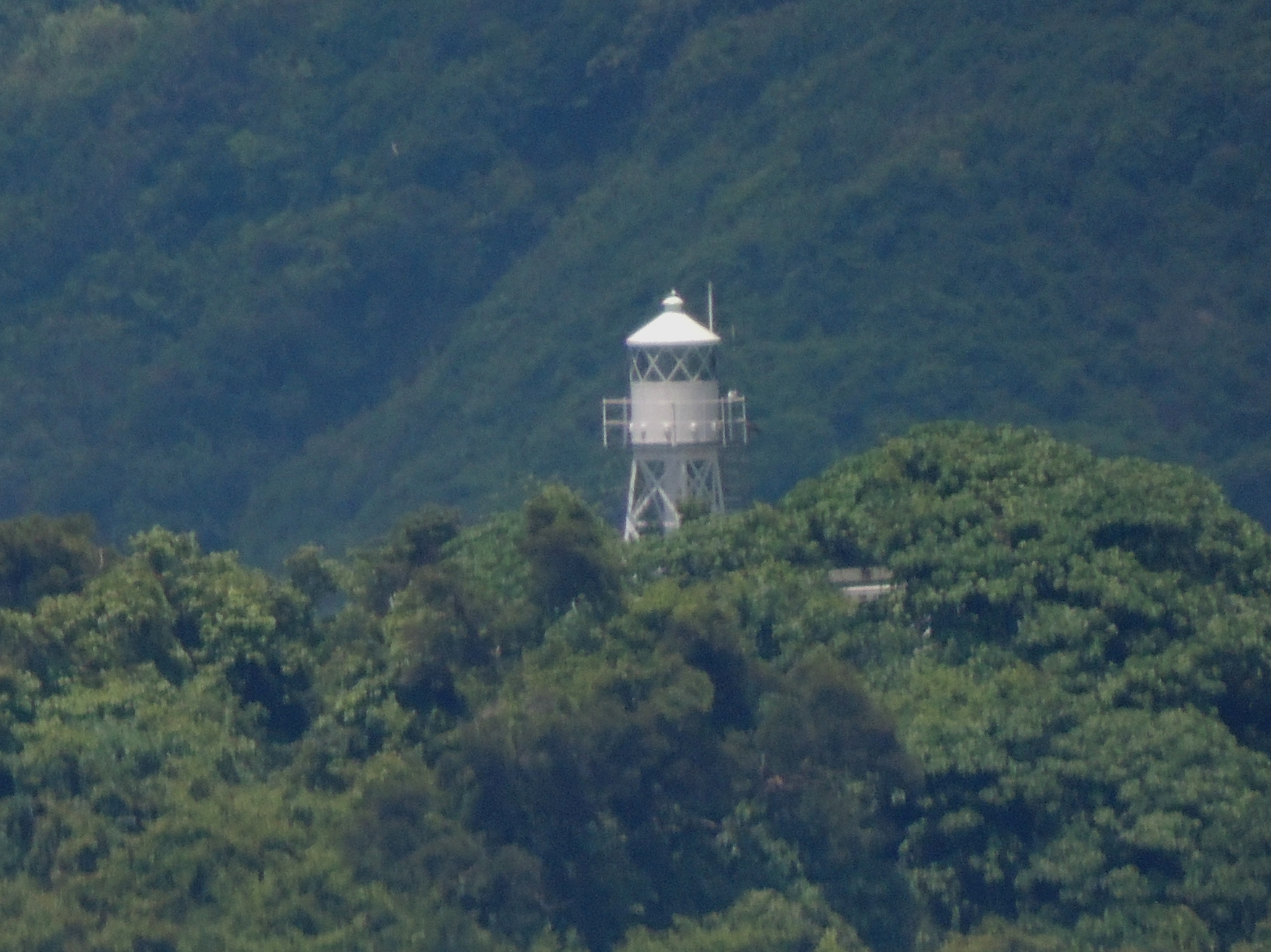 Tang Lung Chau Lighthouse